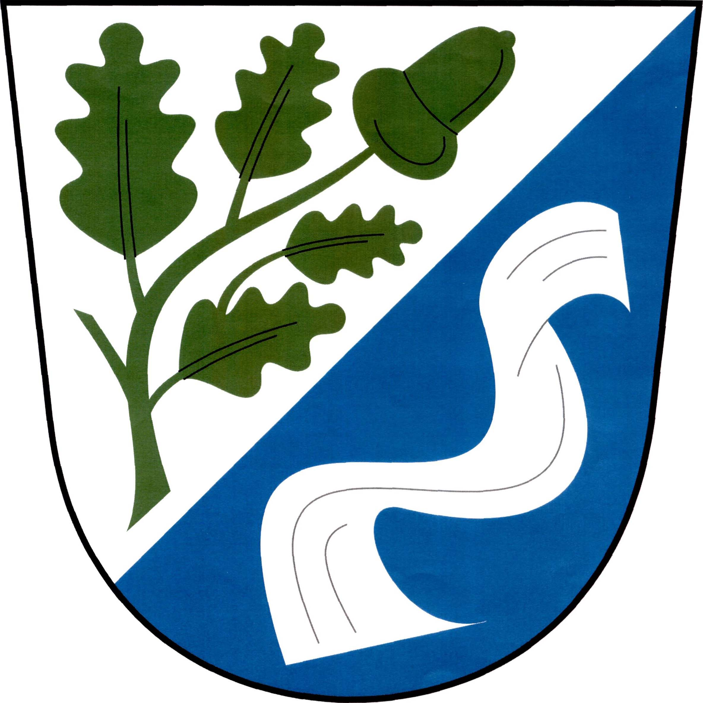 Znak obce Hvozdnice (okres Hradec Králové)